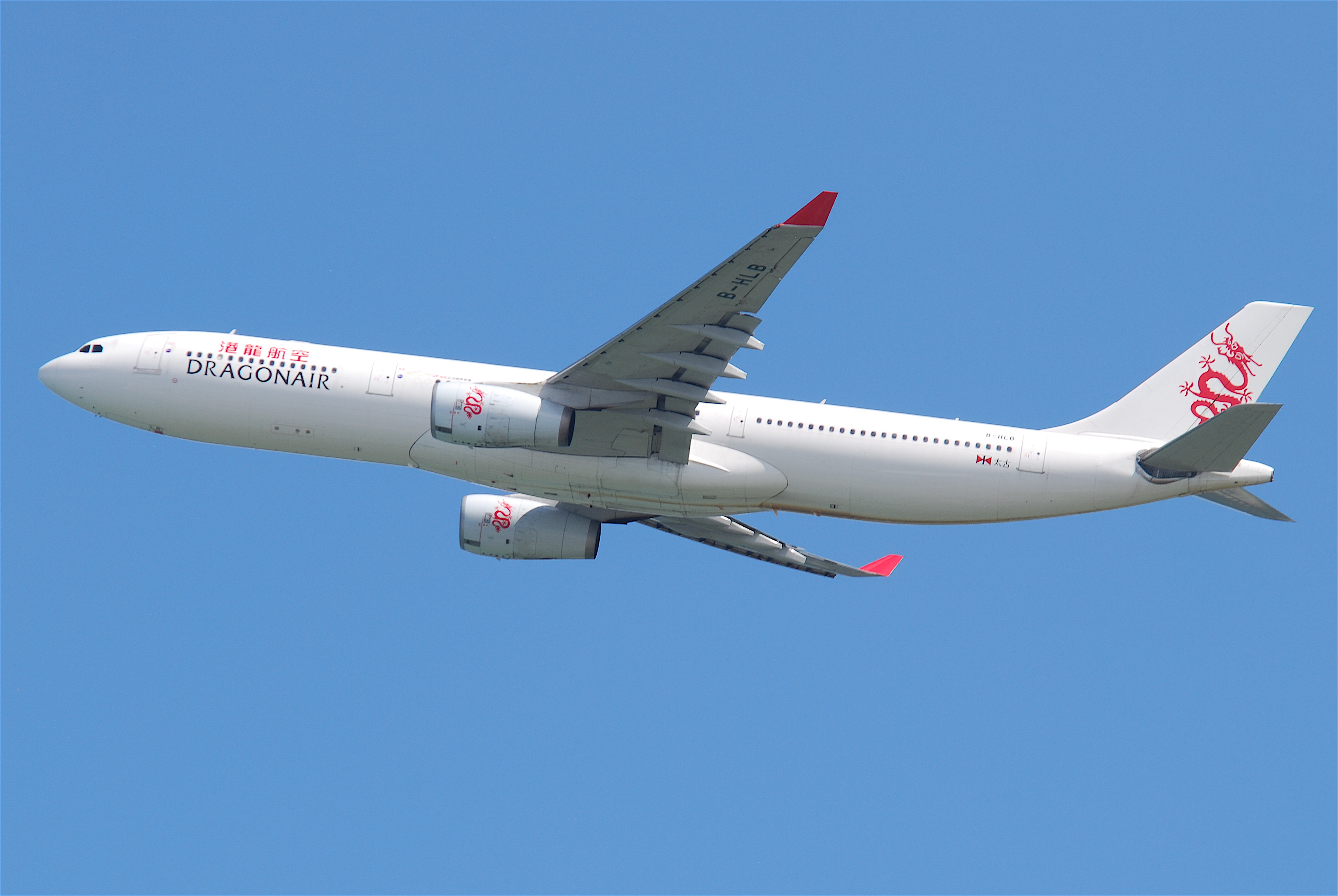 Dragonair Airbus A330-300; B-HLB@HKG;31.07.2011/614rp